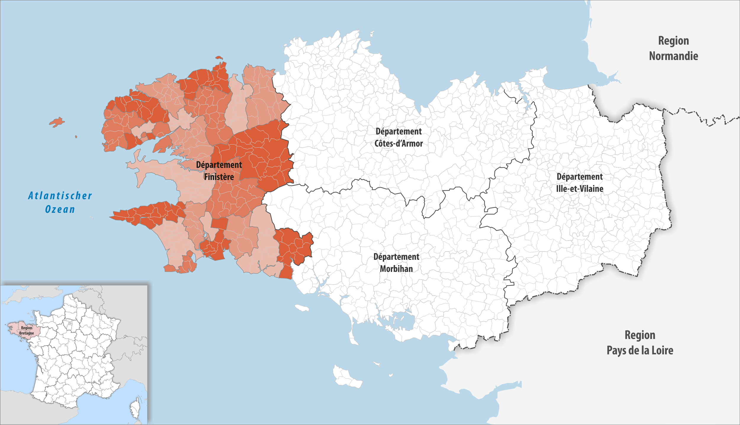 Lage des Departements Finistère